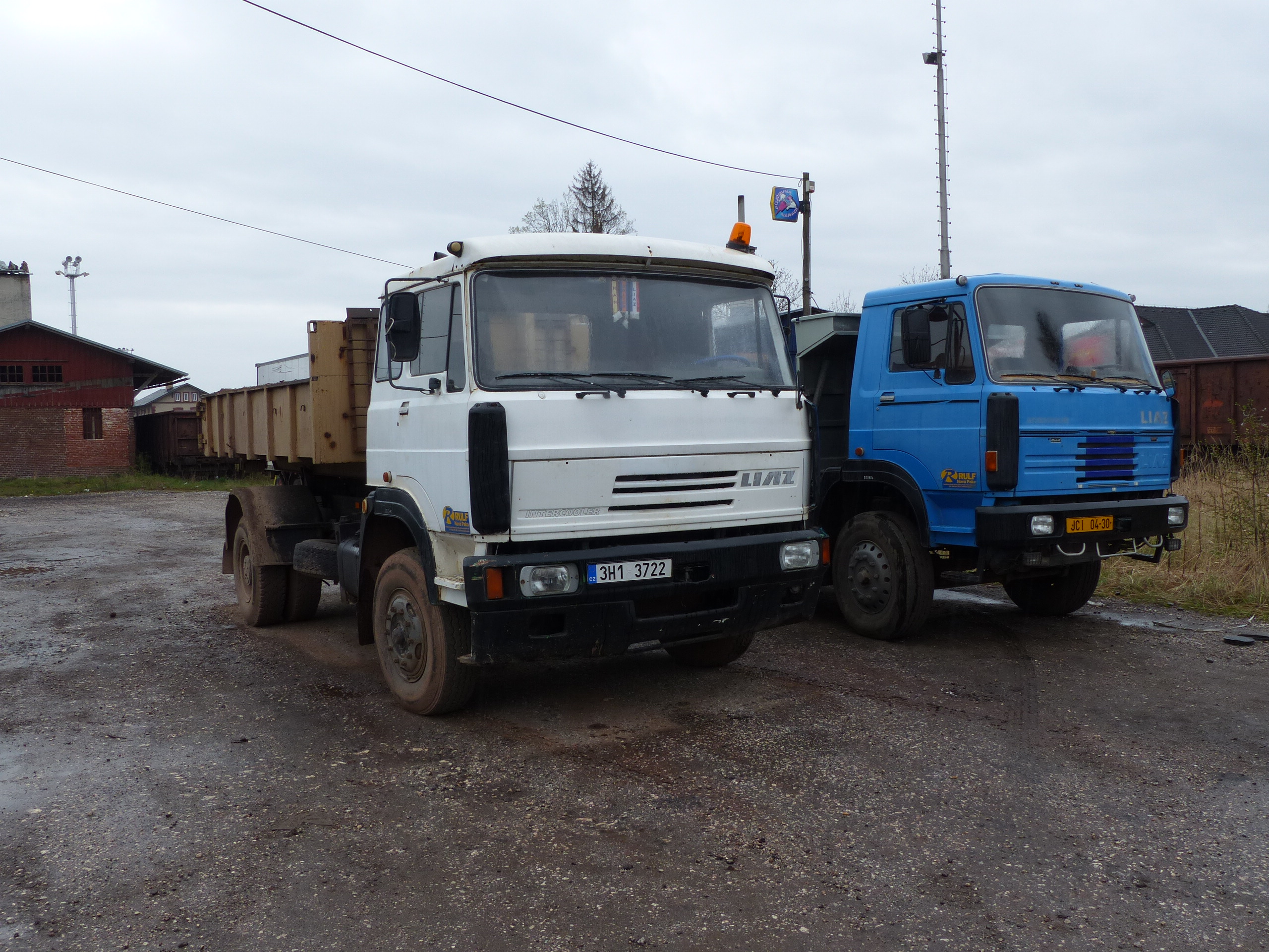 LIAZ 110.051 (bílý) - hákový nosič kontejnerů ¨ LIAZ 150.261 (modrý) - třístranný stavební sklápěč